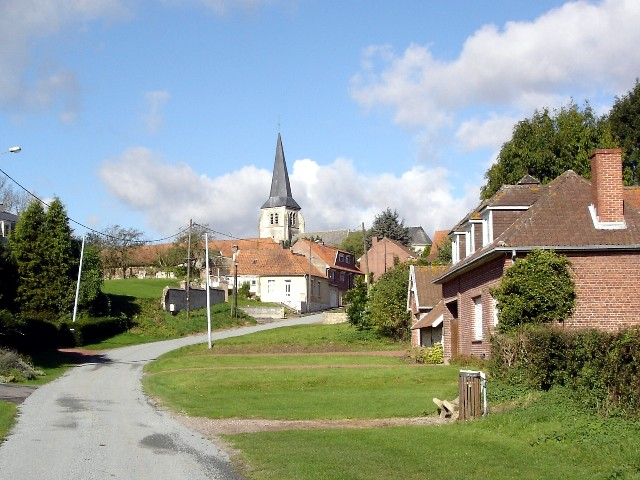 Le village d'Amettes